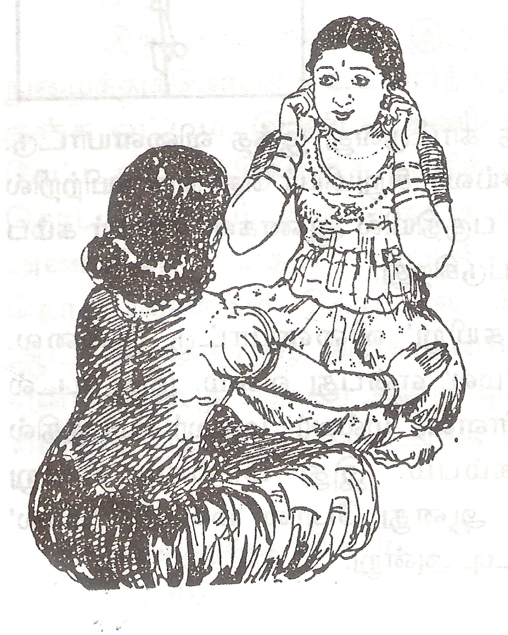 Game “Aindtu-Pandtu” ஐந்து-பந்து or “Anju-Pandhu” அஞ்சுபந்து is a game of Tamil-Nadu, India in rural areas. The image was taken from my own source, a book written by me, Vanishing-Game , Maraikindra Vilaiyaattugal. மறைகின்ற விளையாடுகள், 2002